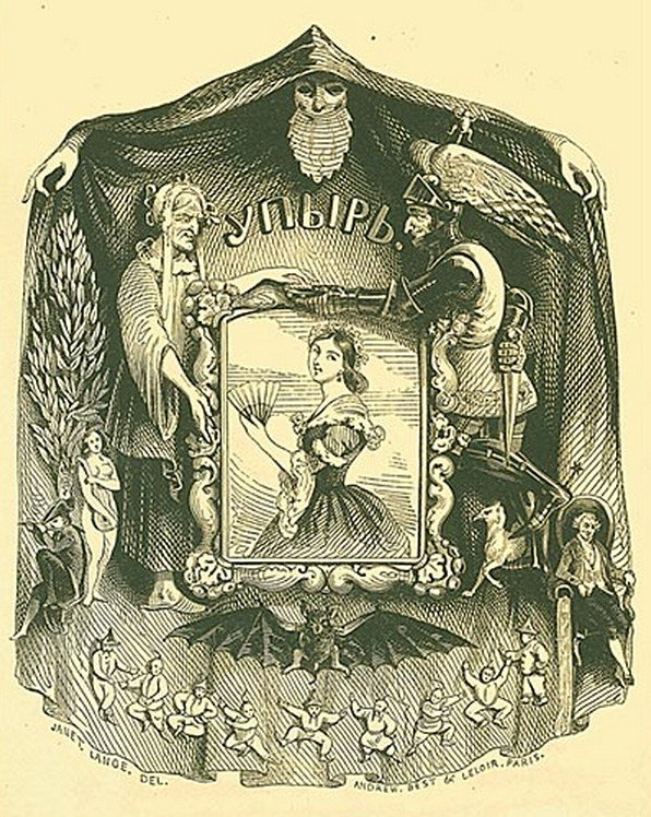 Иллюстрация из первого издания повести «Упырь» А. К. Толстого